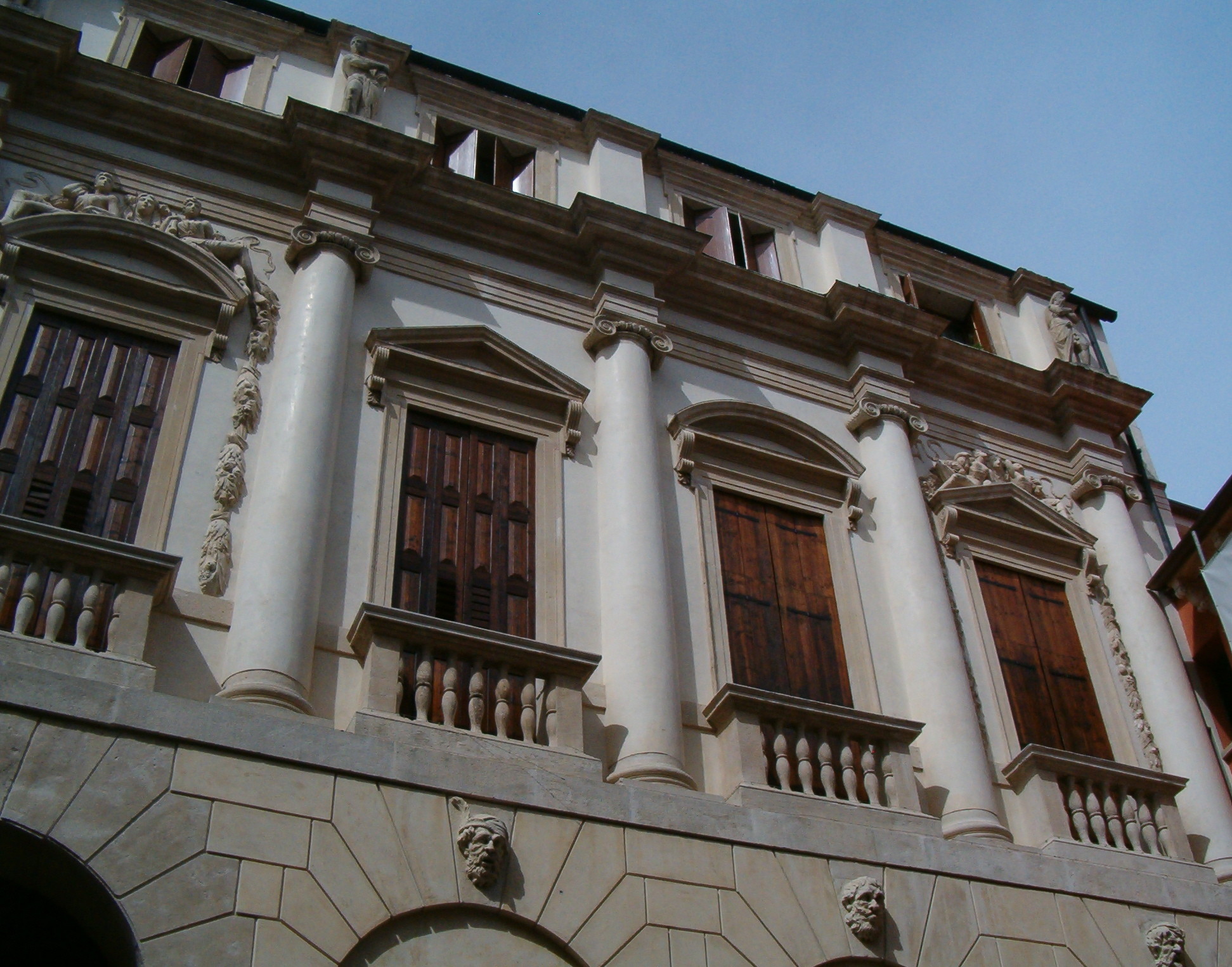 Palazzo Porto, dettaglio facciata. Contrà Porti, Vicenza. Arch. Andrea Palladio (1544 circa-1552).